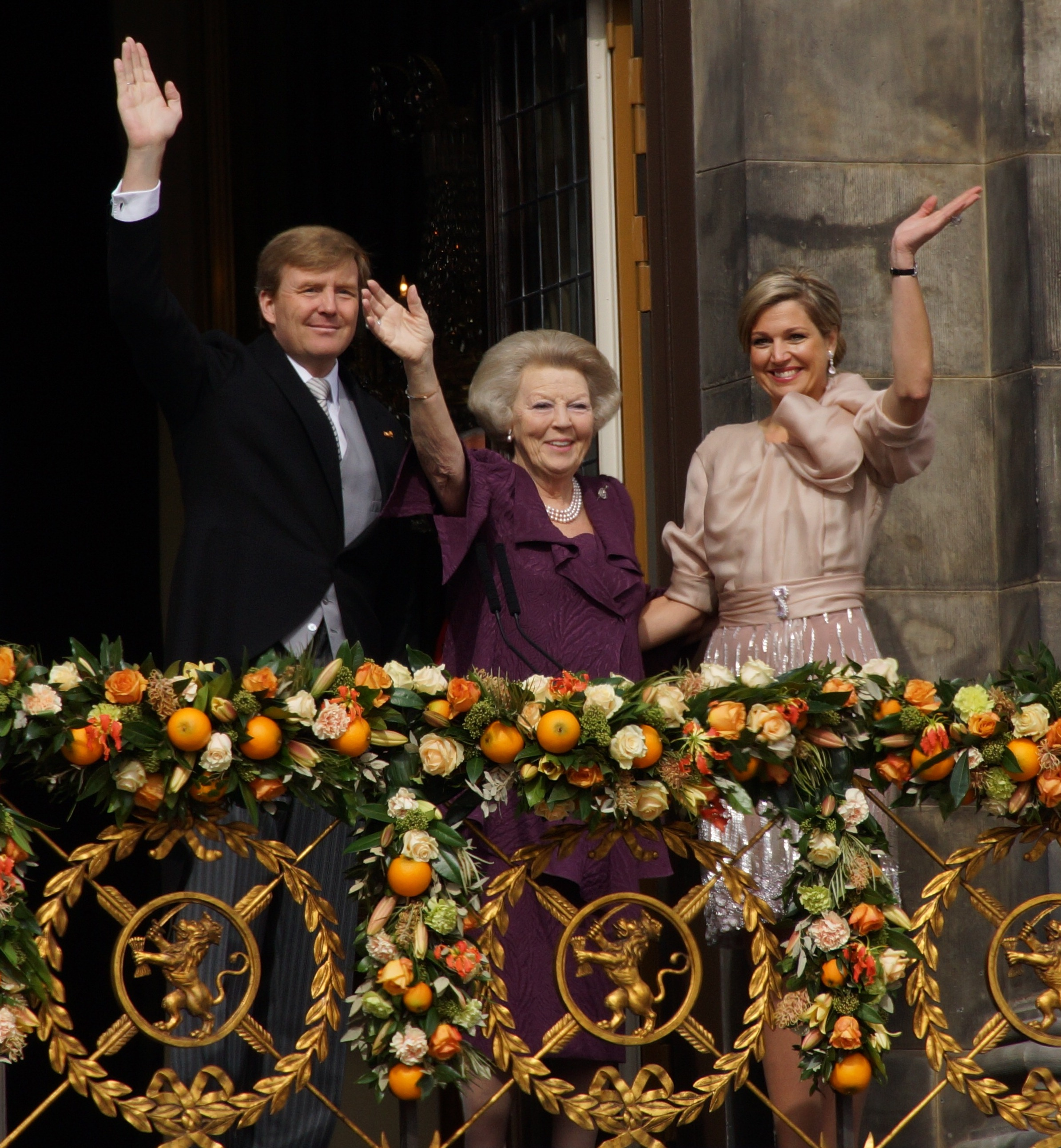 Koning Willem-Alexander, Prinses Beatrix en Koningin Maxima na de aankondiging dat Beatrix afstand van de troon heeft gedaan.